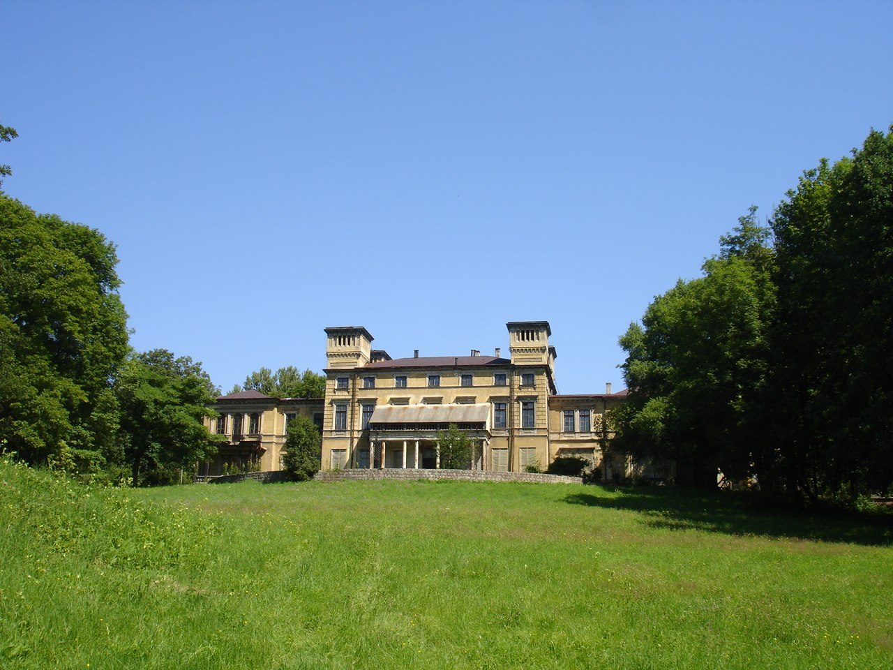 Potockis Palace in Krzeszowice main entrance, made by Francesco Maria Lanci 1850-1858